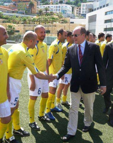 Il Principe Alberto II di Monaco saluta i giocatori della Selezione di calcio della Città del Vaticano in occasione dell'incontro con la Nazionale di calcio del Principato di Monaco del 22 giugno 2013